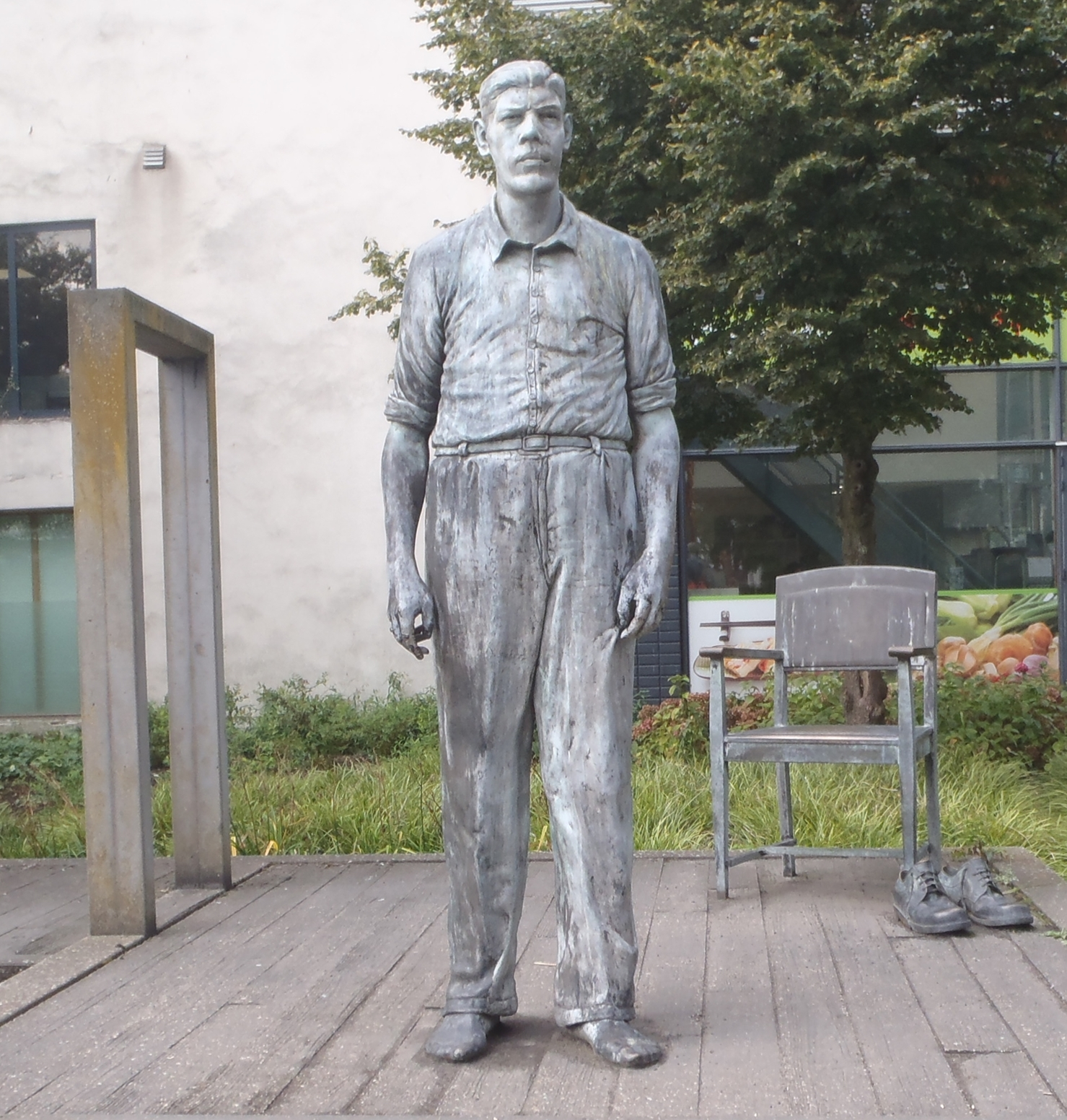 Rotterdam, Wijkpark bij West-Kruiskade. Kunstwerk "Rigardus Rijnhout, reus van Rotterdam" van Herman Lamers. Rotterdam/The Netherlands.